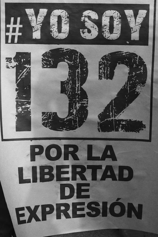 Yo soy 132